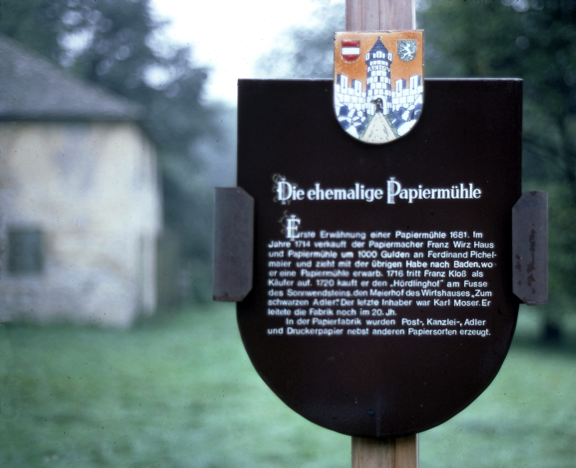 Schottwien, ehem. Papierfabrik, Erinnerungsplakette der Gemeinde, Hintergrund: Anschnitt Papierstampf (1981)